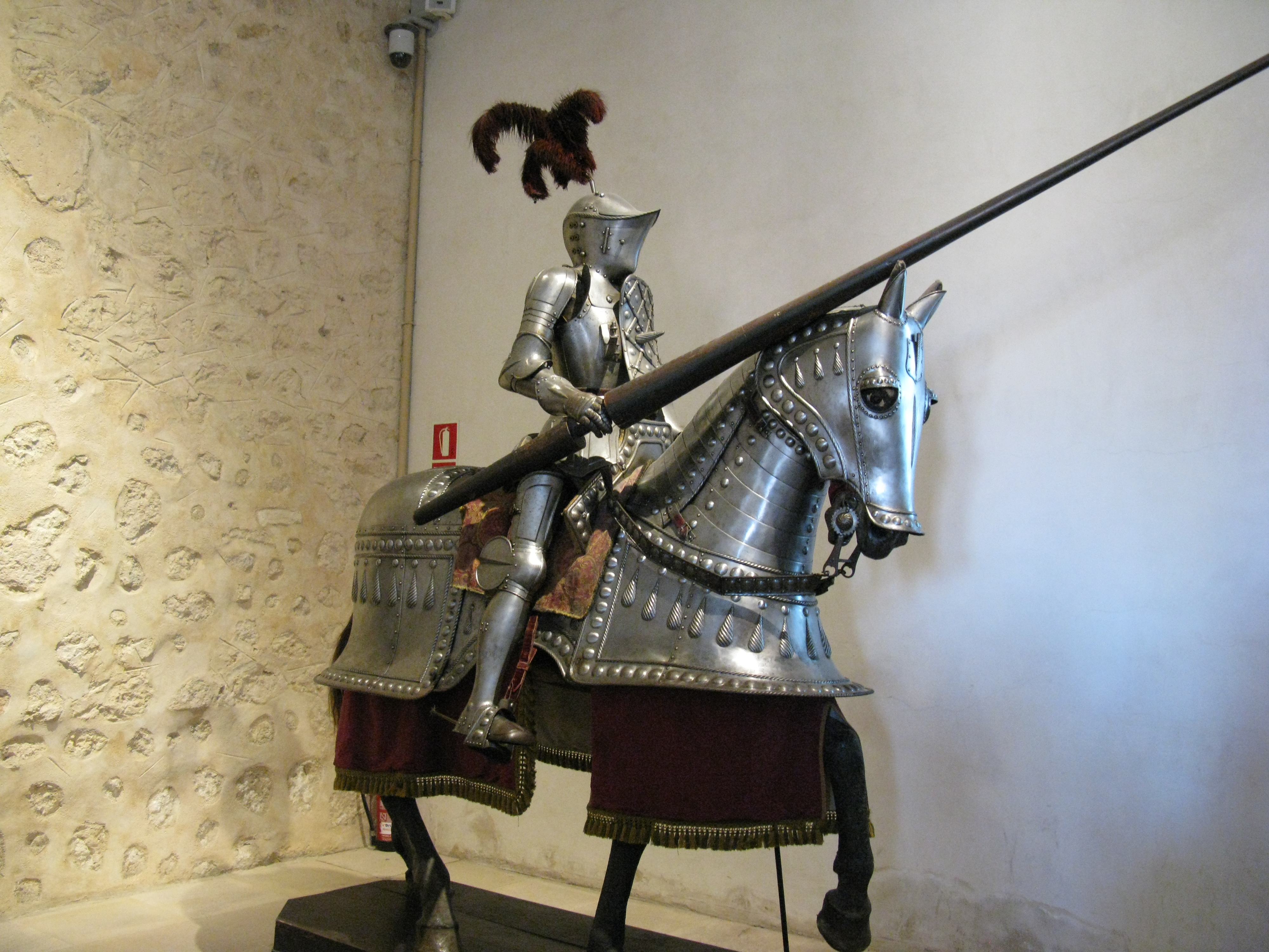 Armadura de caballero en la armería del Alcázar de Segovia (España)